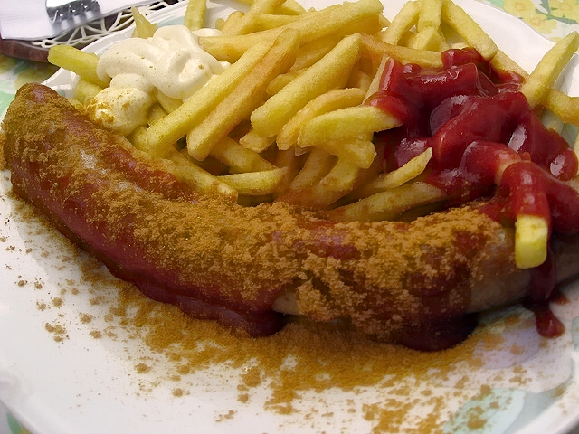 Currywurst mit Pommes frites (und Ketchup und Mayonnaise).